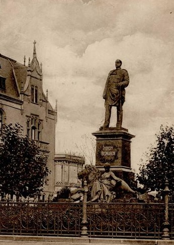 Bismarck ursprüngliches Denkmal